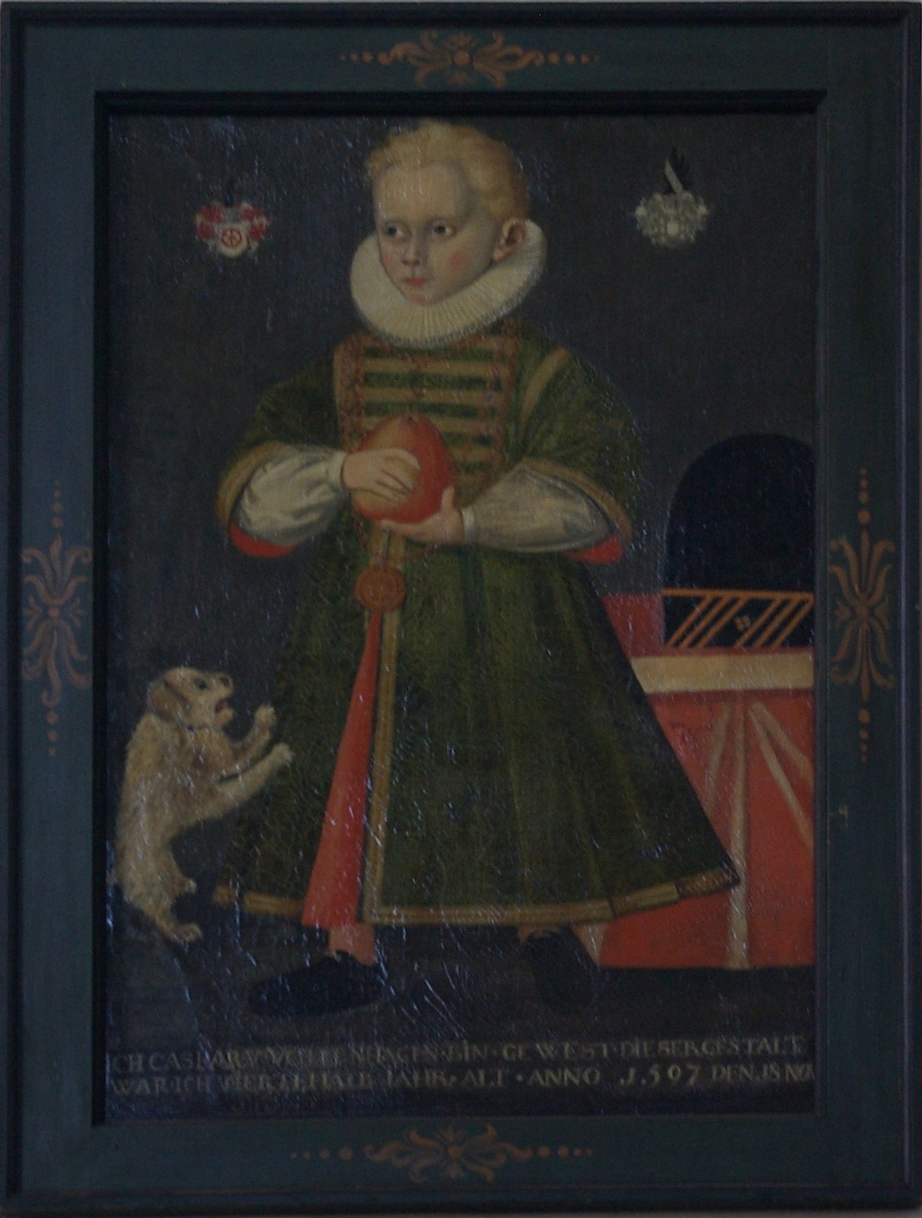 Bad Freienwalde in Brandenburg. Das Bild (Kopie des 1991 gestohlenen Originals) befindet sich in der Kirche. Es zeigt den Jungen Caspar von Uchtenhagen. Der Apfel ist ein Hinweis darauf, dass er vergiftet worden sein soll. Der Hund warnt den Jungen vor dem Verzehr des Apfels.